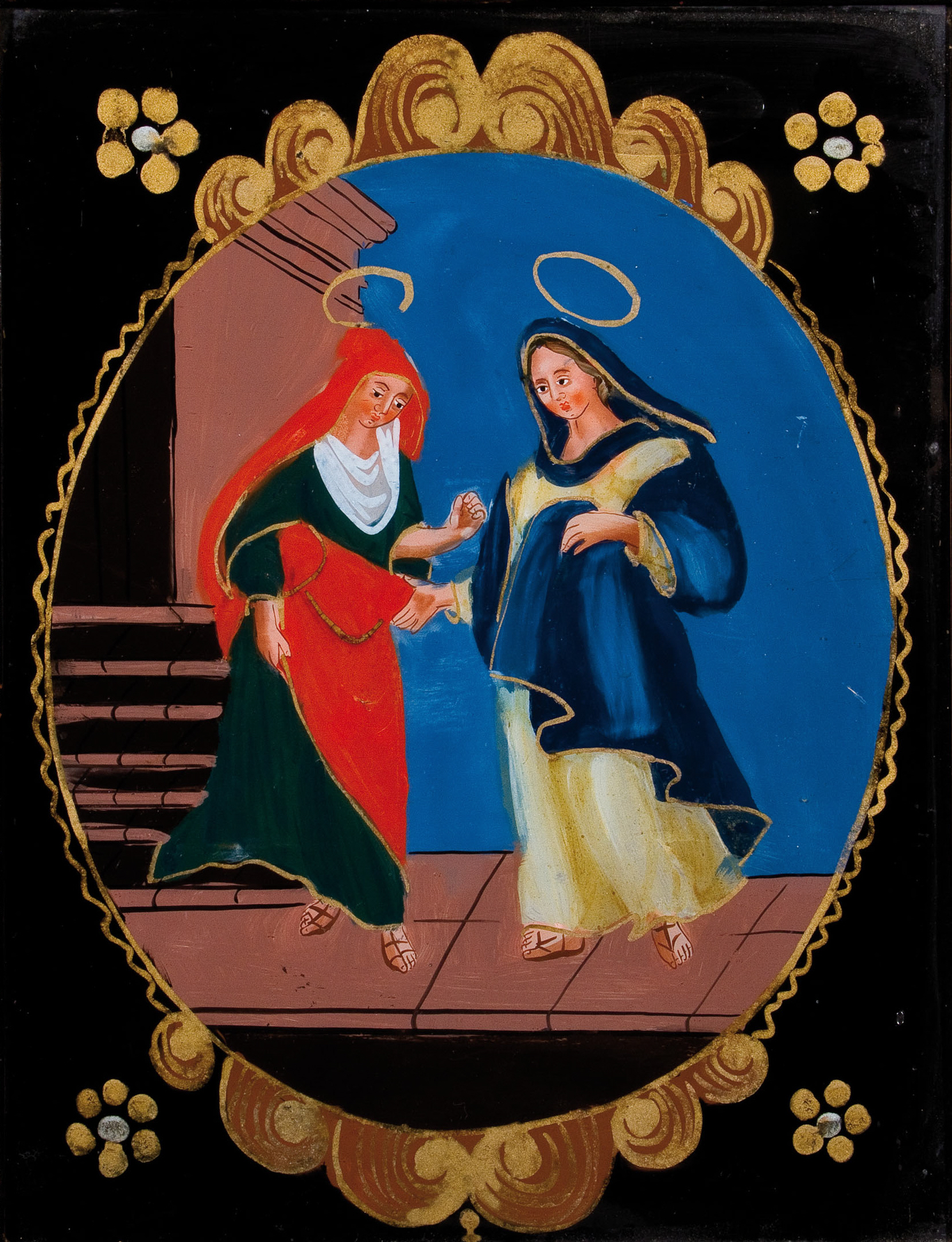 Maria bei Elisabeth, Hinterglasbild, 36 x 29 cm. 1. Viertel 19. Jh.